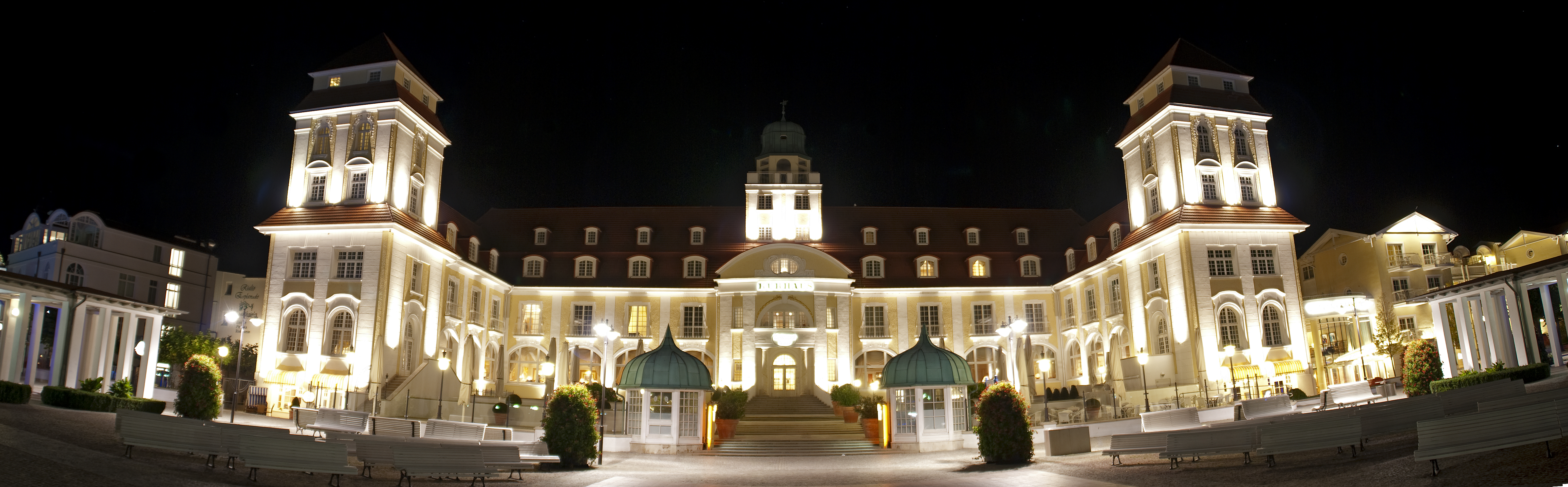 Kurhaus Seebad Binz Panorama Nachtaufnahme